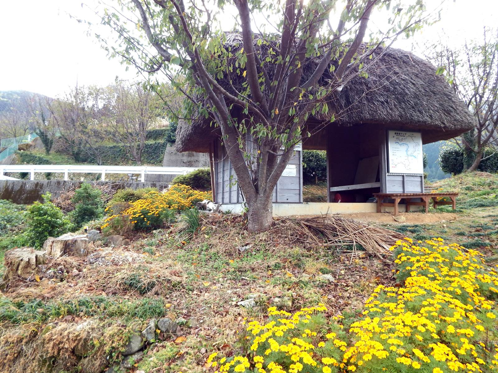 阿波遍路道鶴林寺道にある茅葺の休憩所